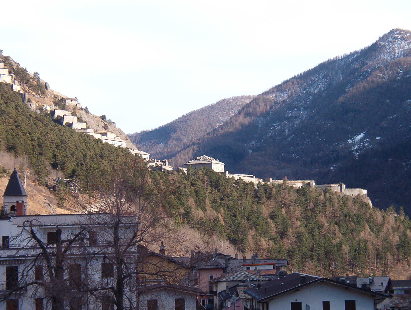 Visione d'insieme del Forte di Fenestrelle - Val Chisone - Piemonte - Italy